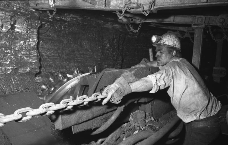 Italienische Gastarbeiter (Bergleute) in Walsum